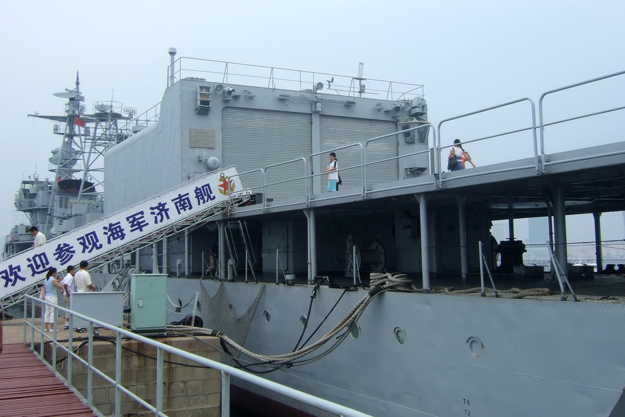 中文（中国大陆）: 051型(旅大级)导弹驱逐舰济南号（舷号105）艉部直升机机库以及起降平台，拍摄于青岛海军博物馆